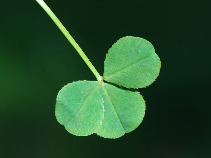 Trifolium repens, trèfle blanc, feuille